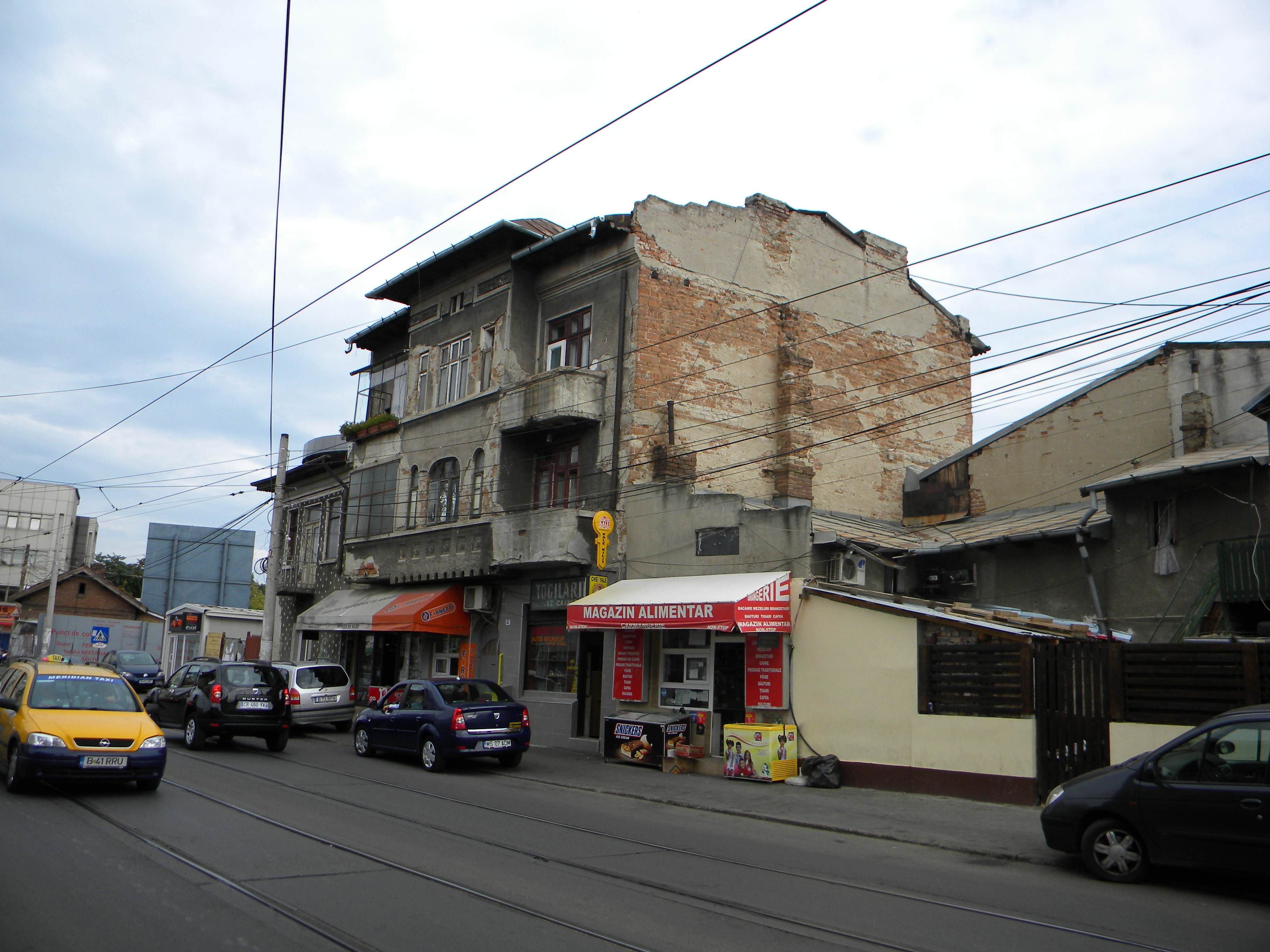 Bucuresti, Romania, Casa pe Str. Lizeanu nr. 40, sect. 2 (vedere de ansamblu) (2)